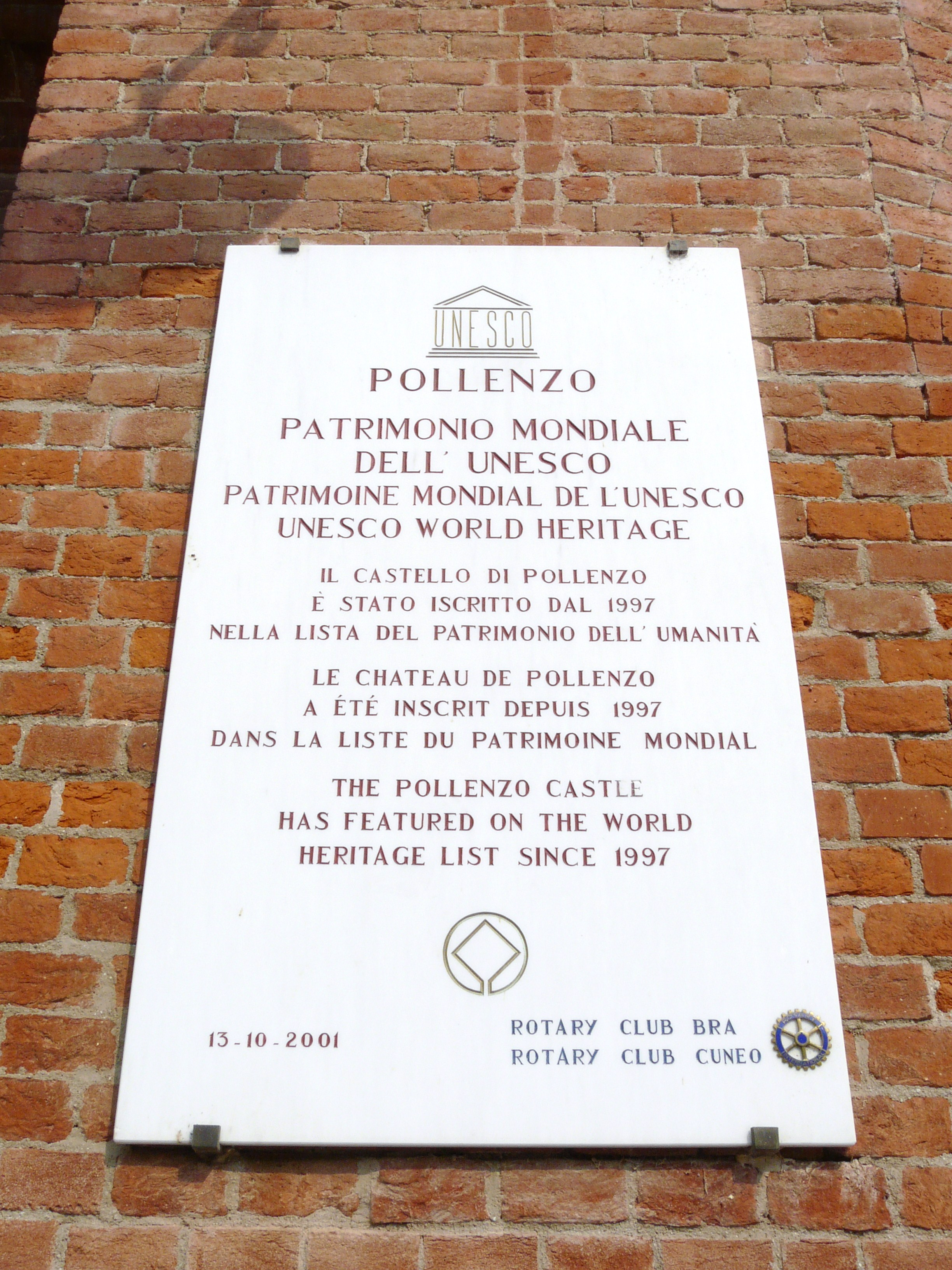 Targa di Pollenzo Patrimonio Mondiale dell'Unesco, Comune di Bra, Piemonte, Italia